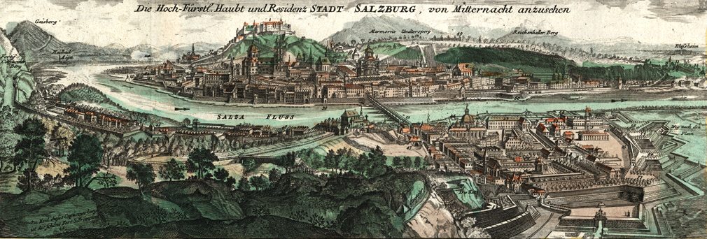 Salzburg, Panorama from: Prospectus Elegantiores Splendidissimae Archiepiscopalis Urbis Salisburgensis praecipuarumque in ea Illustrium, ac maxime mirabilium, tam Sacrarum quam profanarum Aedium